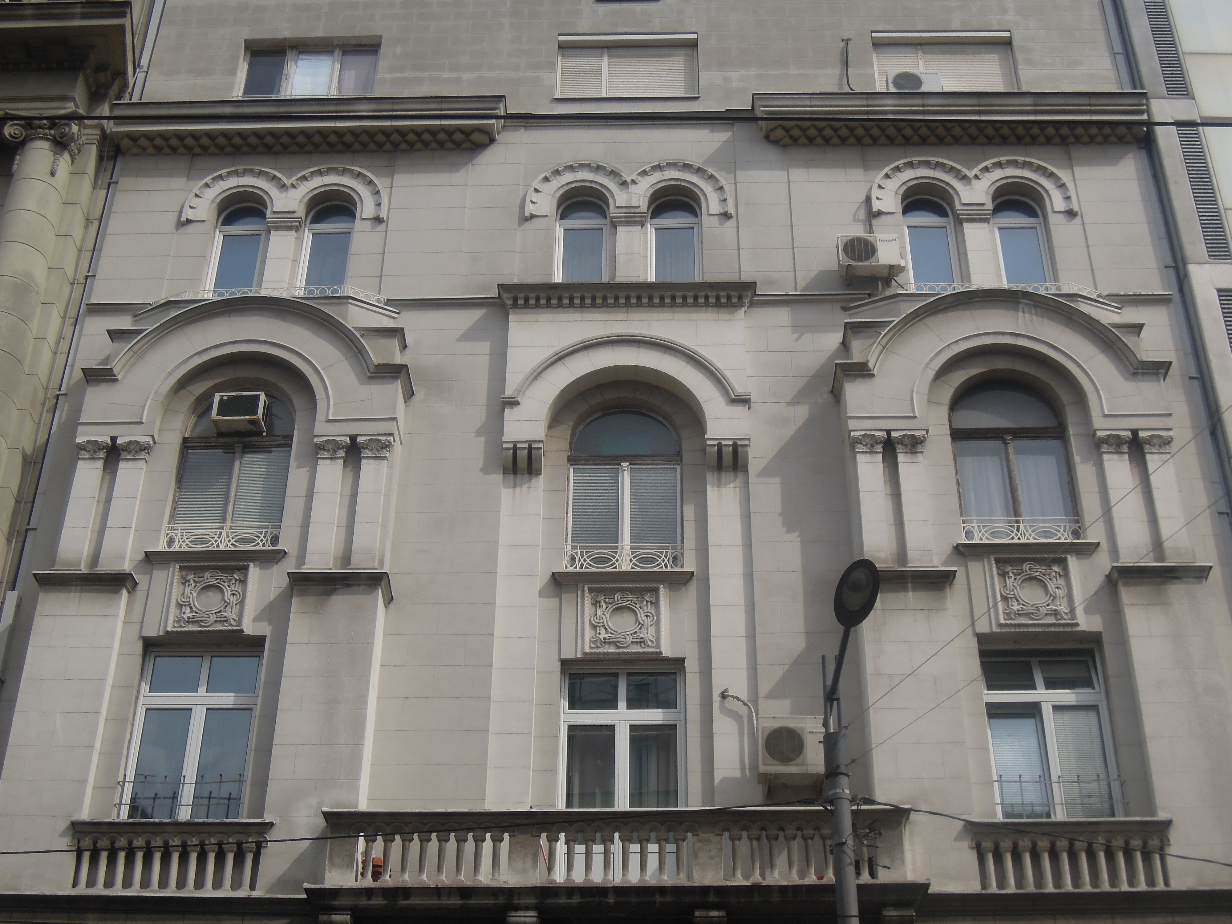 Zgrada u Ulici kralja Milana br. 3 U Beogradu.